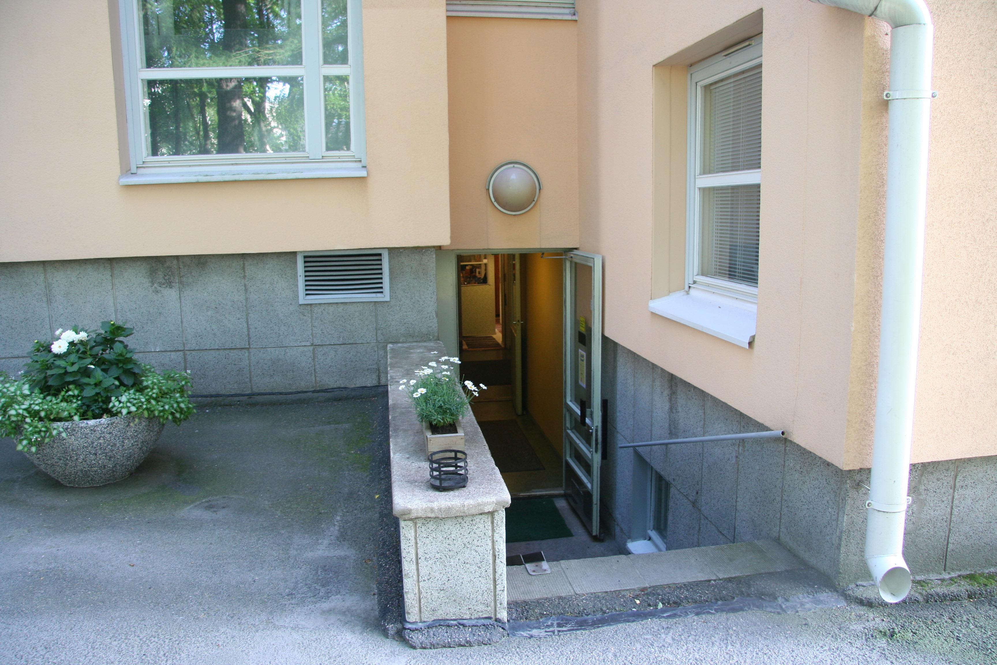 Sauna Hermannin sisäänkäynti, Helsinki